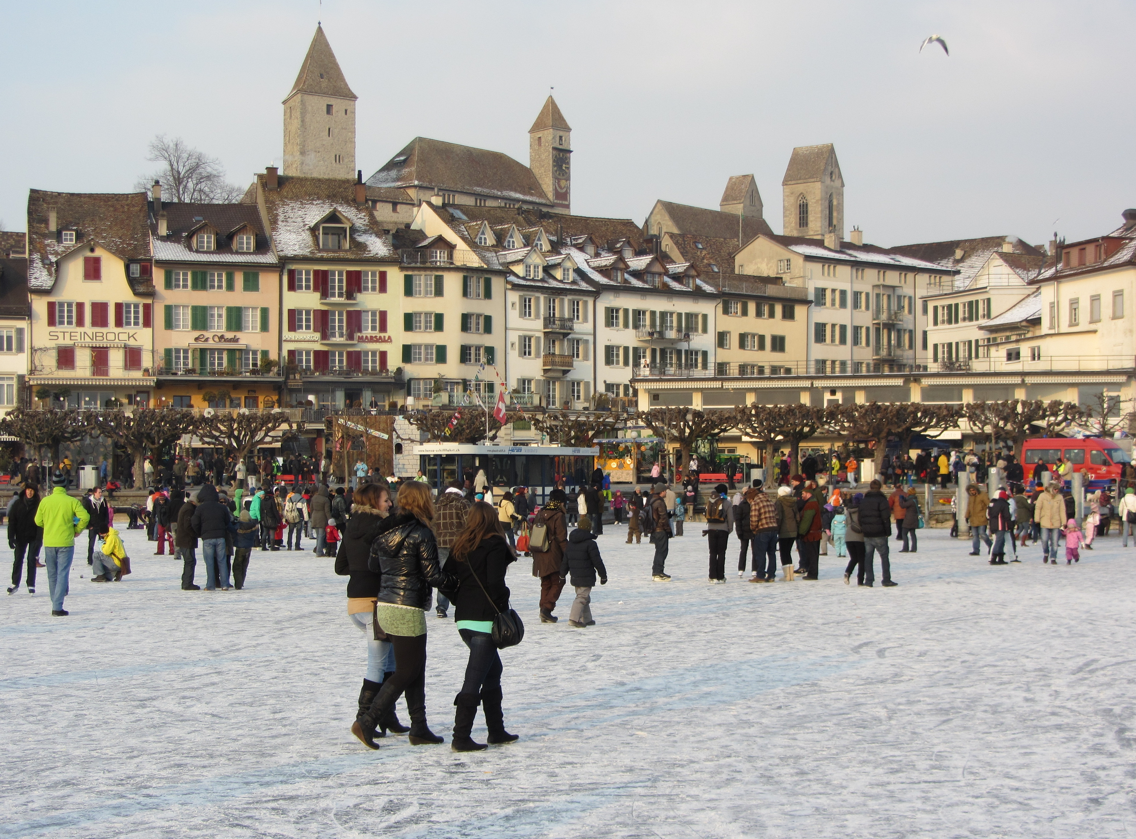 Zürichsee Seegfrörni, harbour area in Rapperswil (Switzerland)